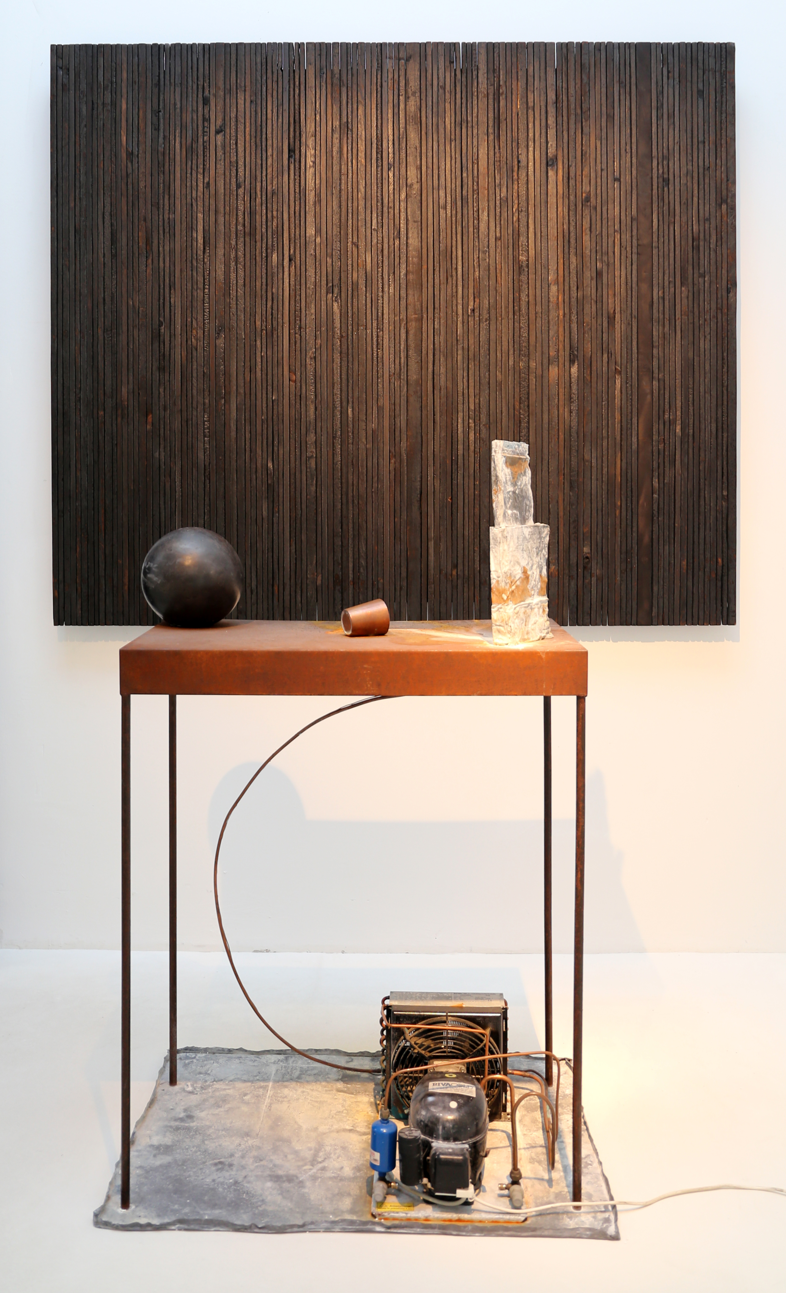 Centro per l'arte contemporanea Luigi Pecci This is a photo of a monument which is part of cultural heritage of Italy.